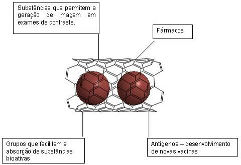 fig 14